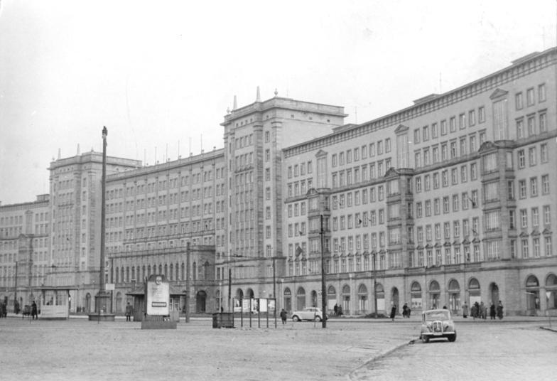 Leipzig, Ringbau, Wohnblocks Zentralbild Zimmermann 7.4.1956 Leipzig UBz: Blick auf den Ringbau in Leipzig.